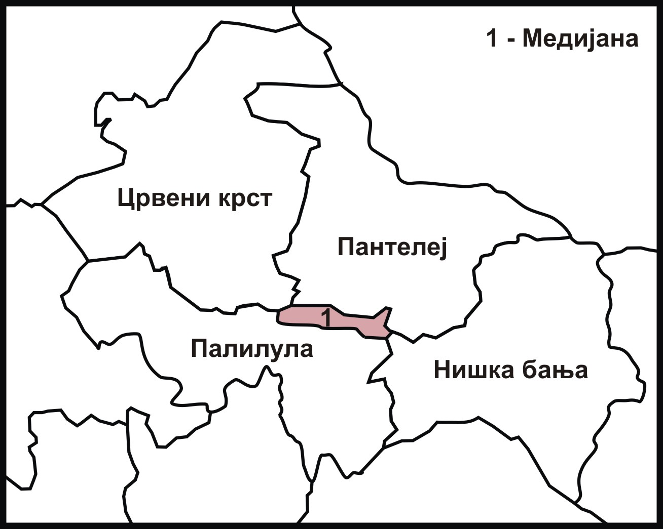 Gradska opština Medijana.